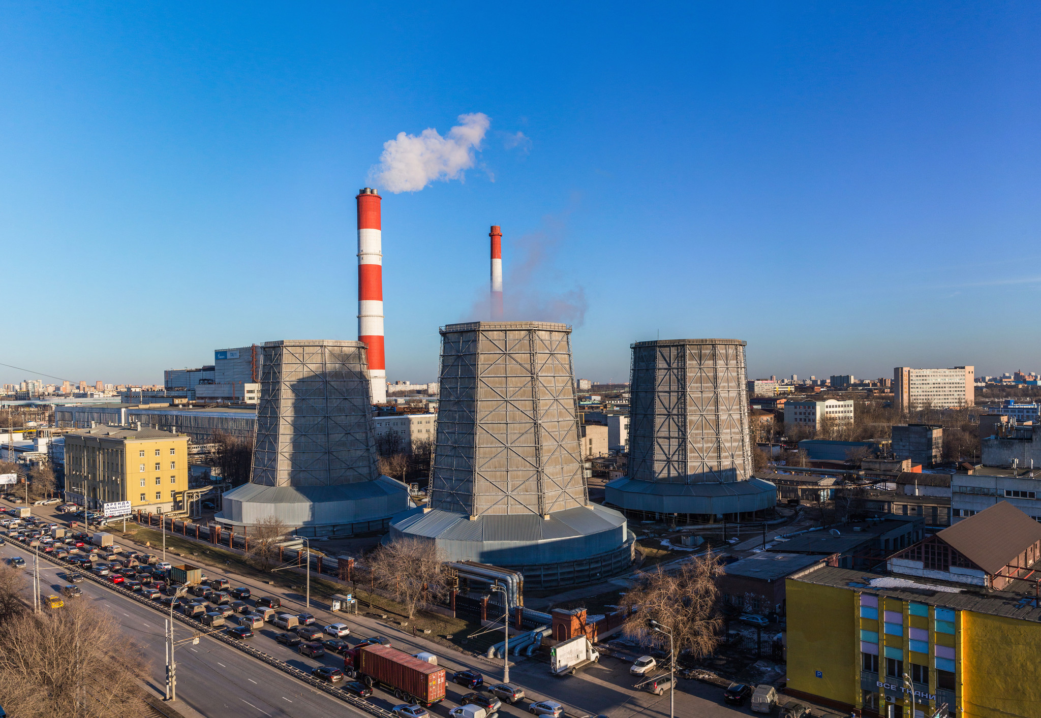 ТЭЦ-11 филиал компании ПАО «Мосэнерго»